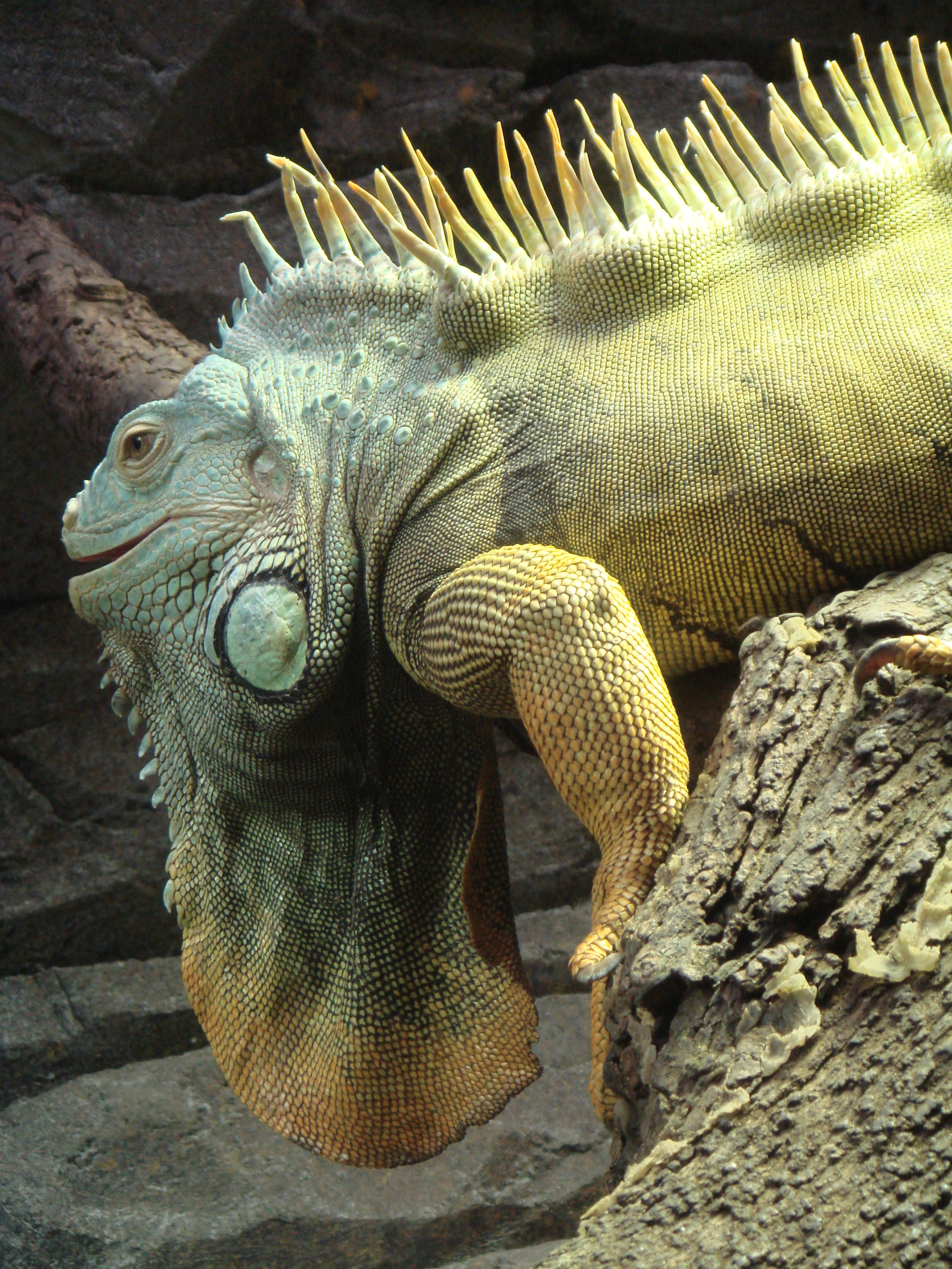 Iguana sp. Foto tomada en el Zoo de Madrid.